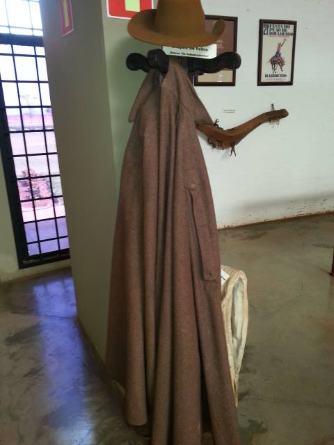 Museu do porque do peão Barretos